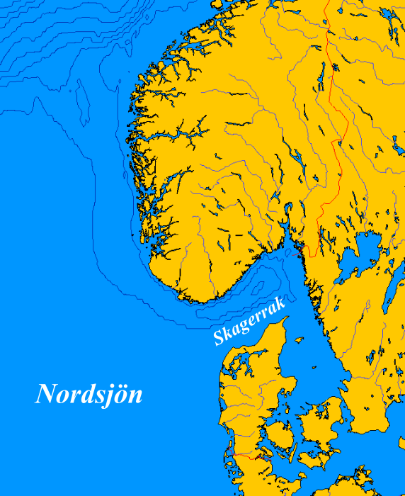 Norska rännan